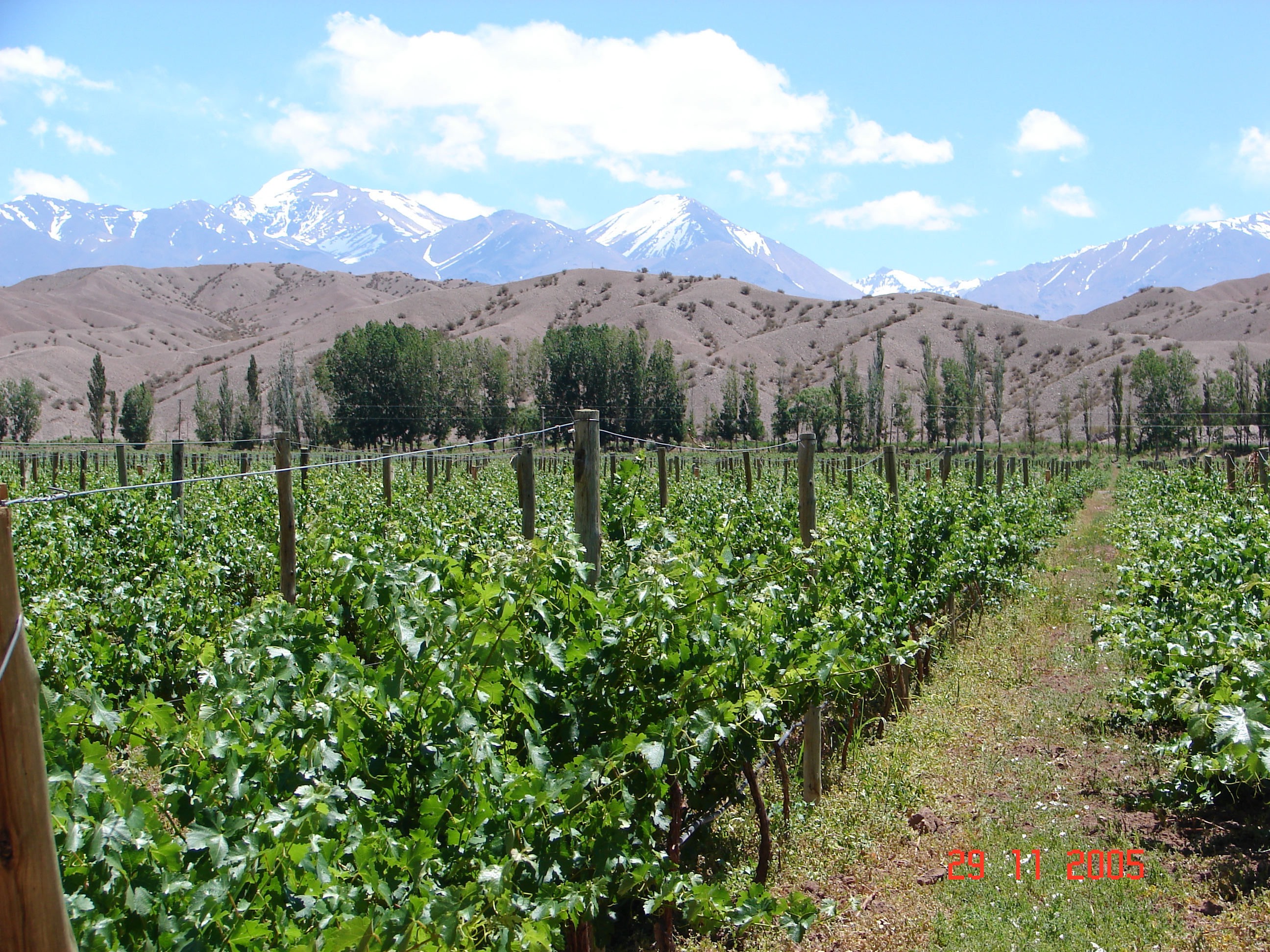 Plantaciones de vid en Finca Nevada en la localidad de Tamberías en el departamento Calingasta, provincia de San Juan, Argentina.